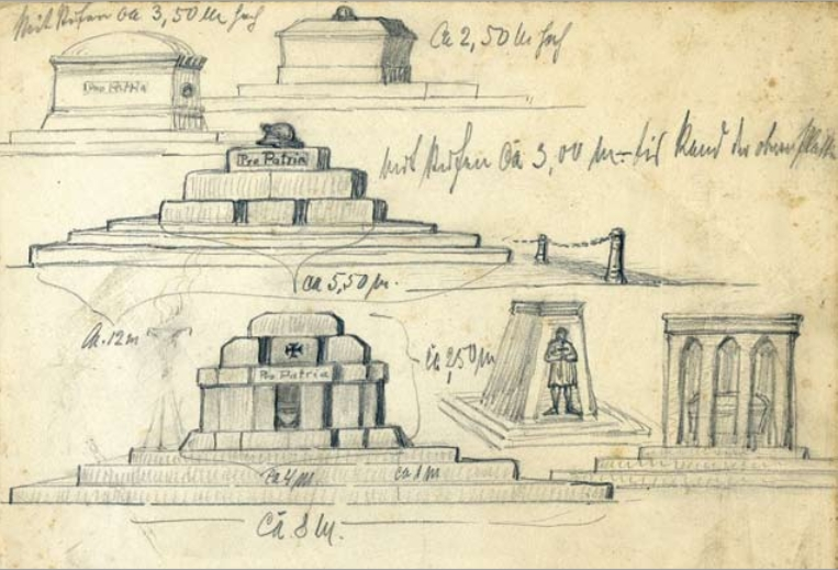 Entwurfsskizze von Franz Mohr für Erinnerungsstätten für die Opfer des I. Weltkrieges, Ortsarchiv Müschede